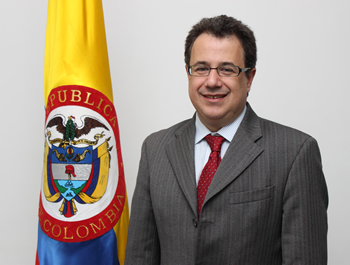 El Ministro de la Protección Social Mauricio Santamaría.